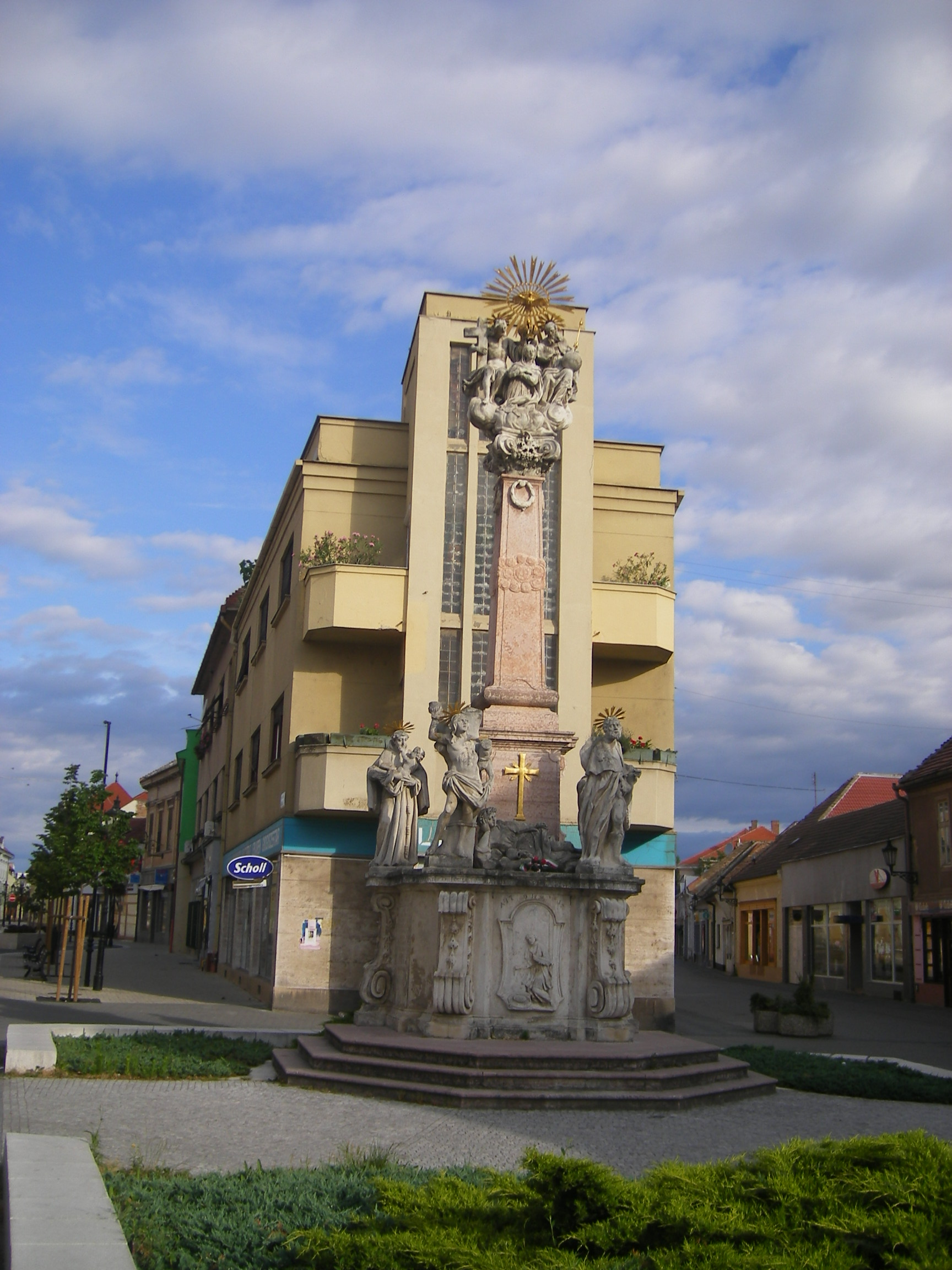 Komárom - Szentháromság-szobor